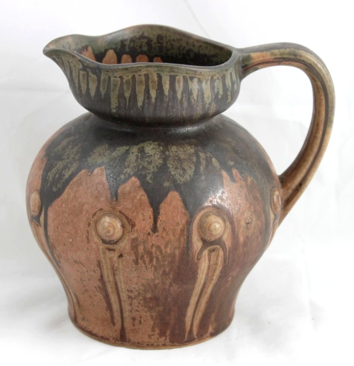 Pichet en grès n°356, Manufacture Denbac, Vierzon, France, vers 1930